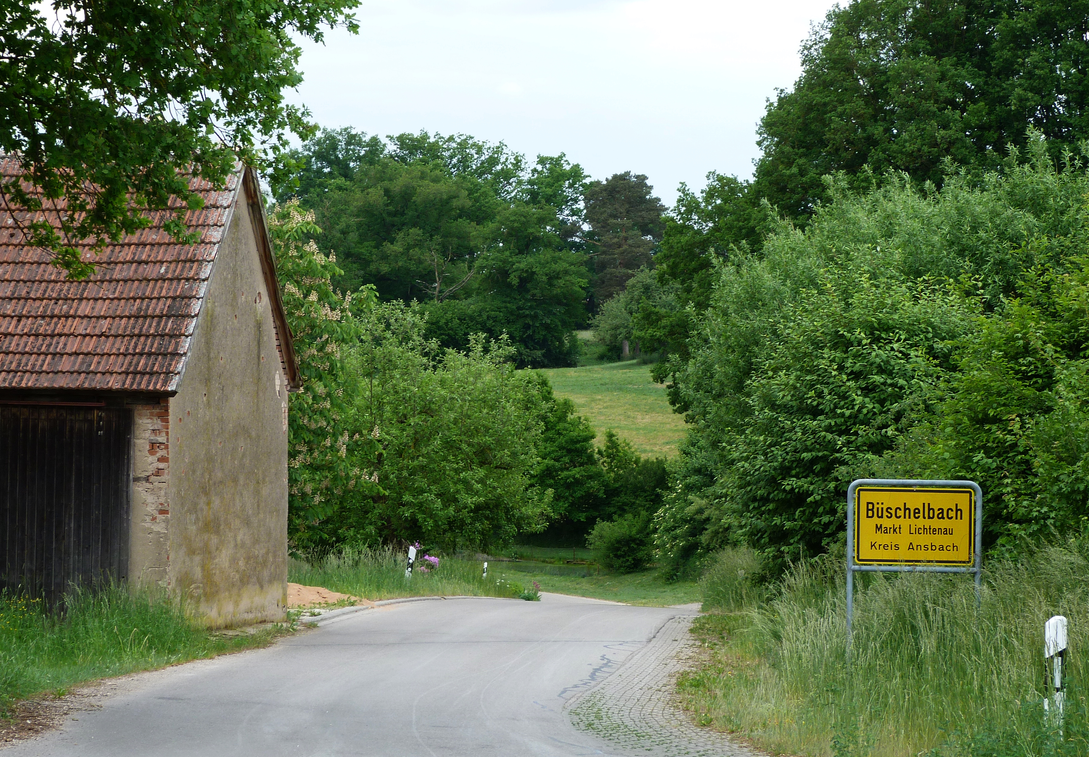 Ortseinfahrt